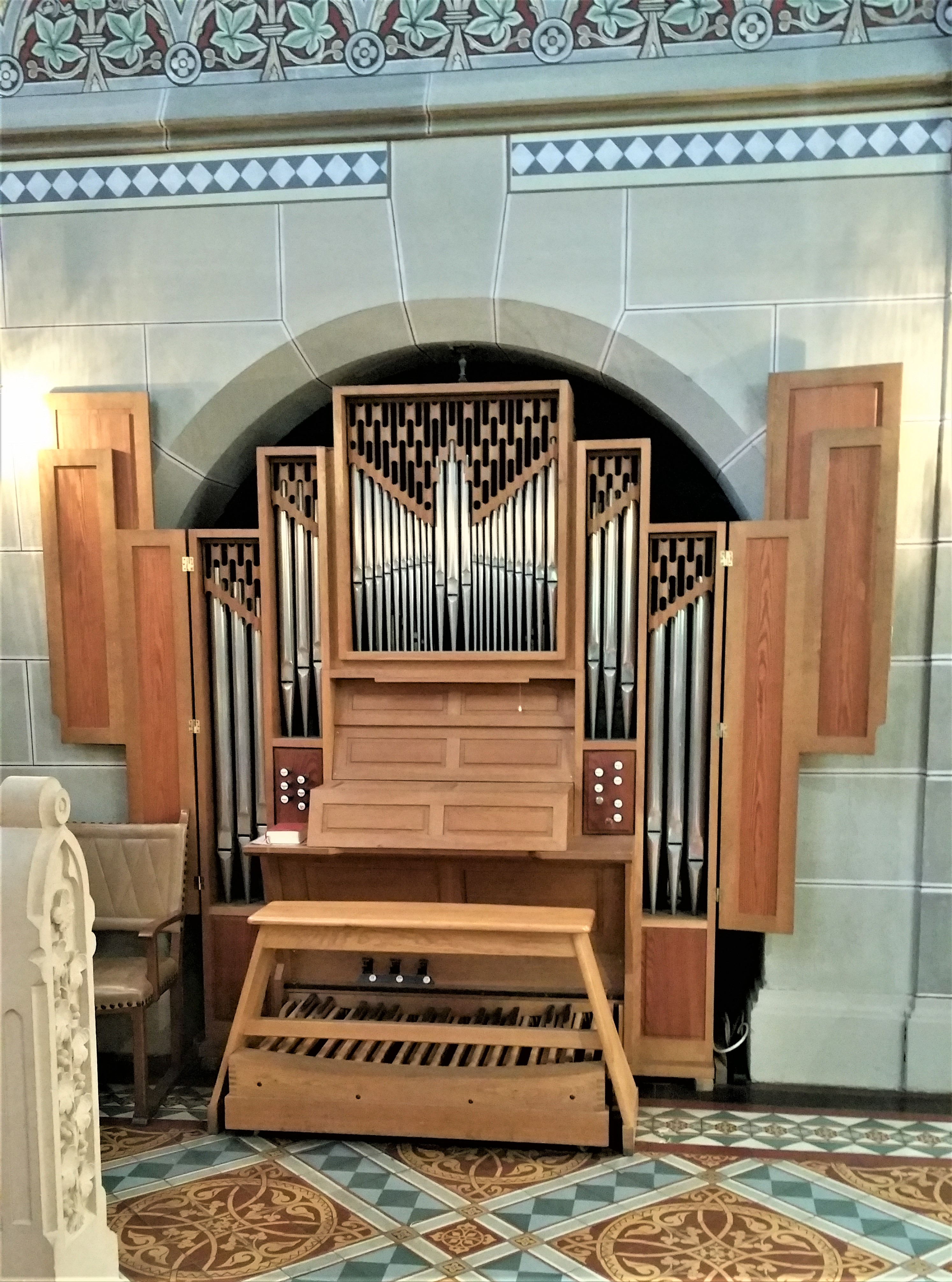 Dortmund Asseln ev Kirche, ChorOrgel